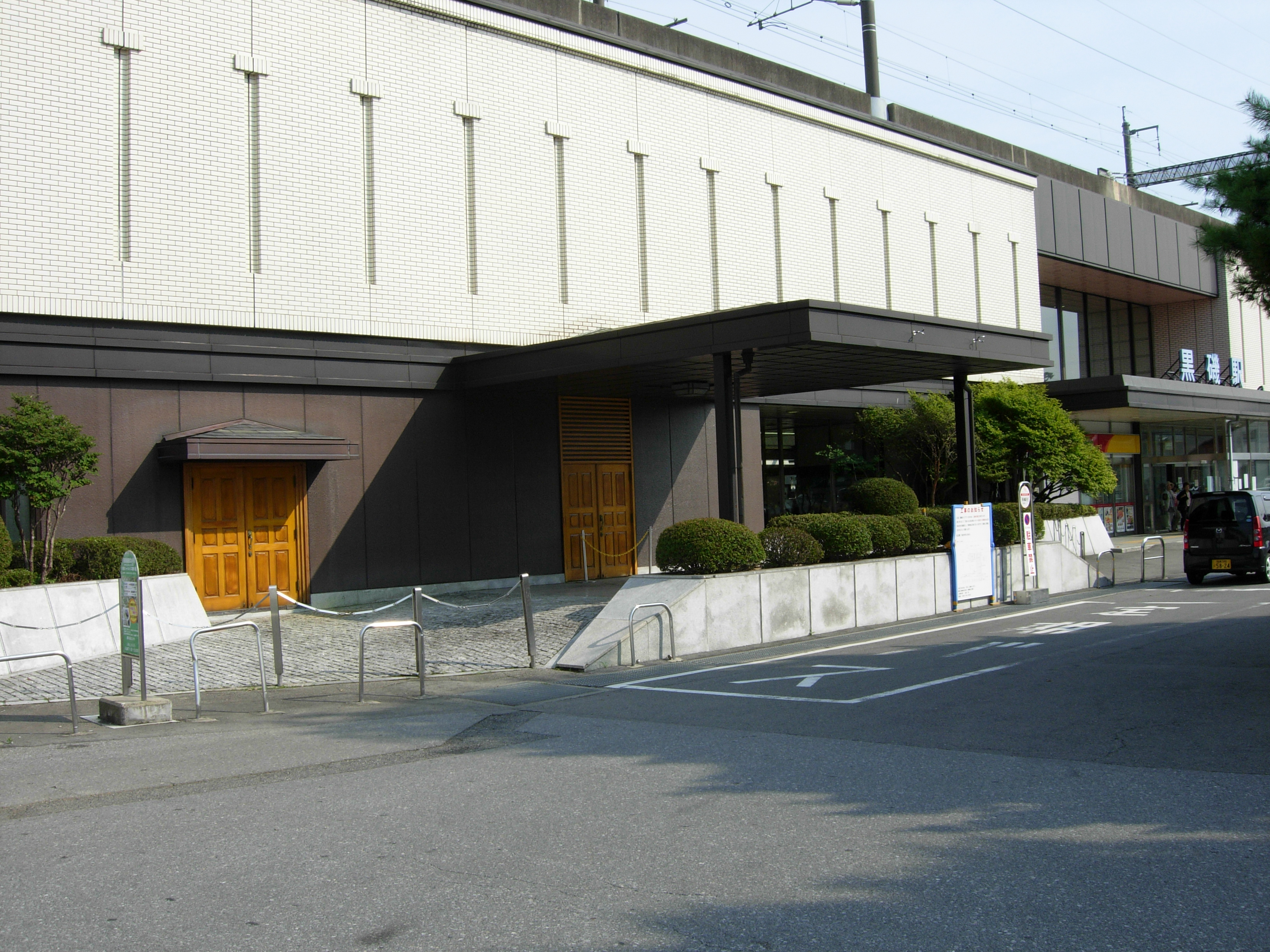 黒磯駅の皇室専用出口の写真です。